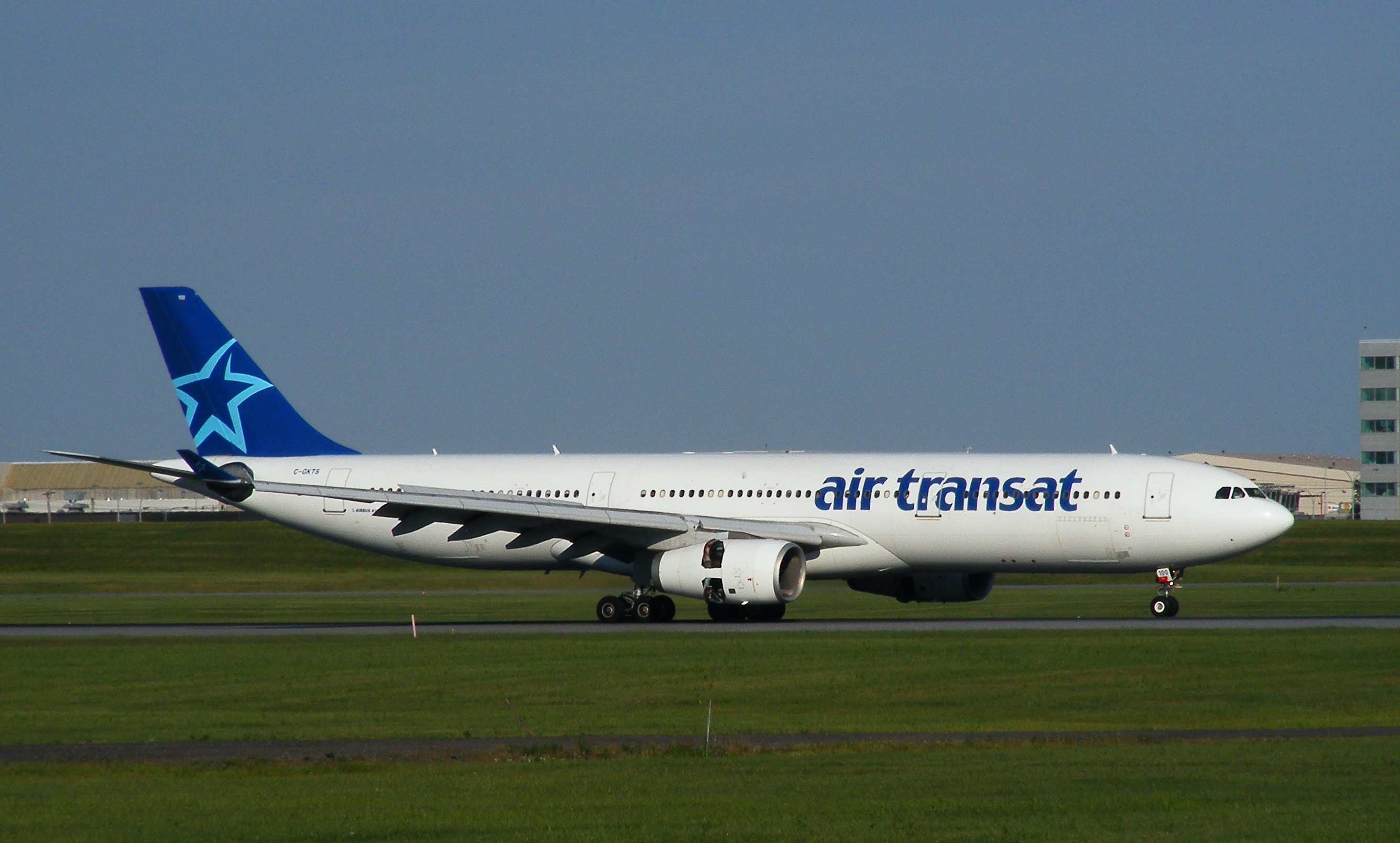 Airbus A330-300 d'Air Transat. Atterrissage à l'aéroport Montréal-Trudeau (YUL# (Québec, Canada).